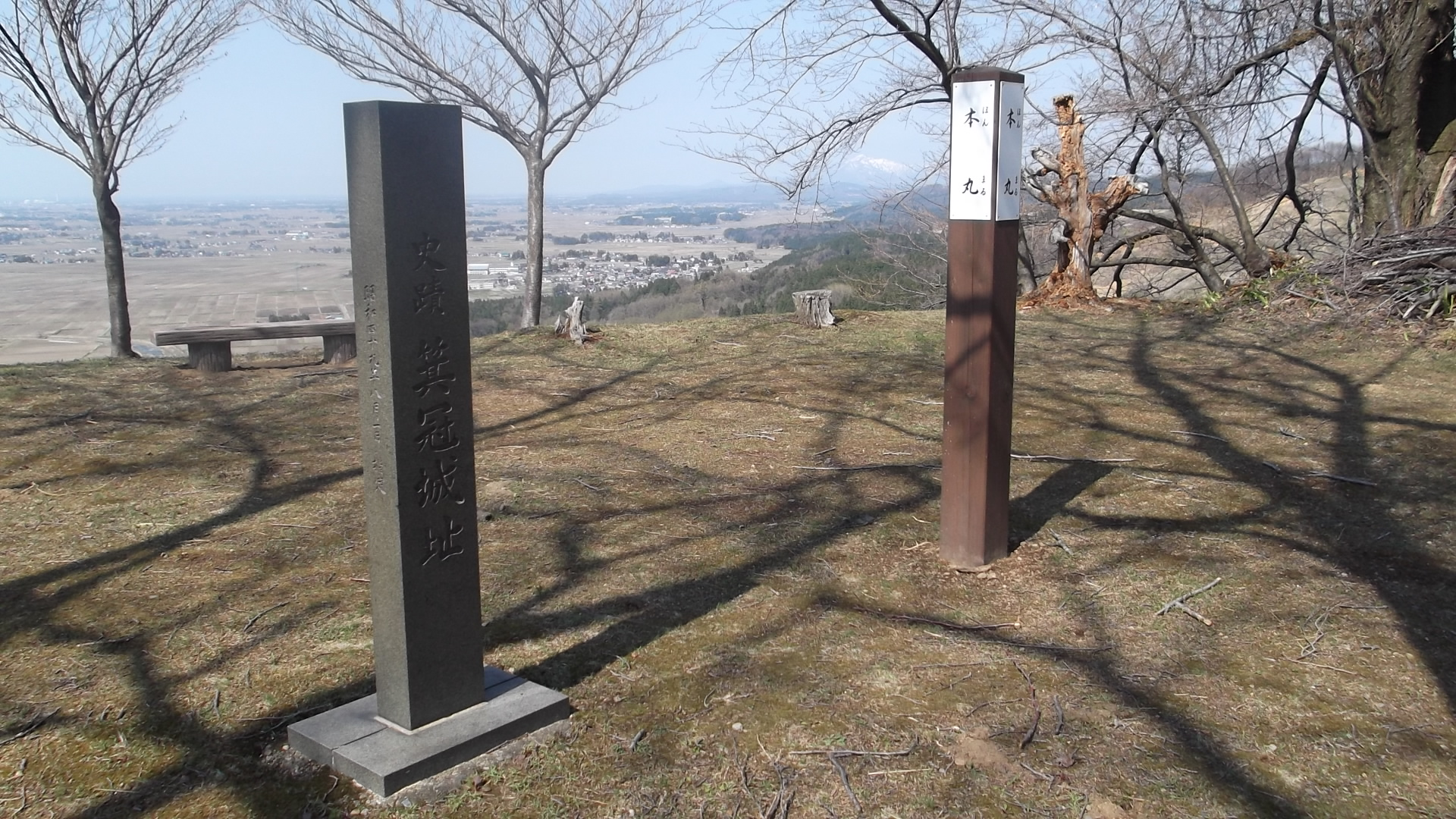 箕冠城本丸跡（新潟県上越市板倉区）